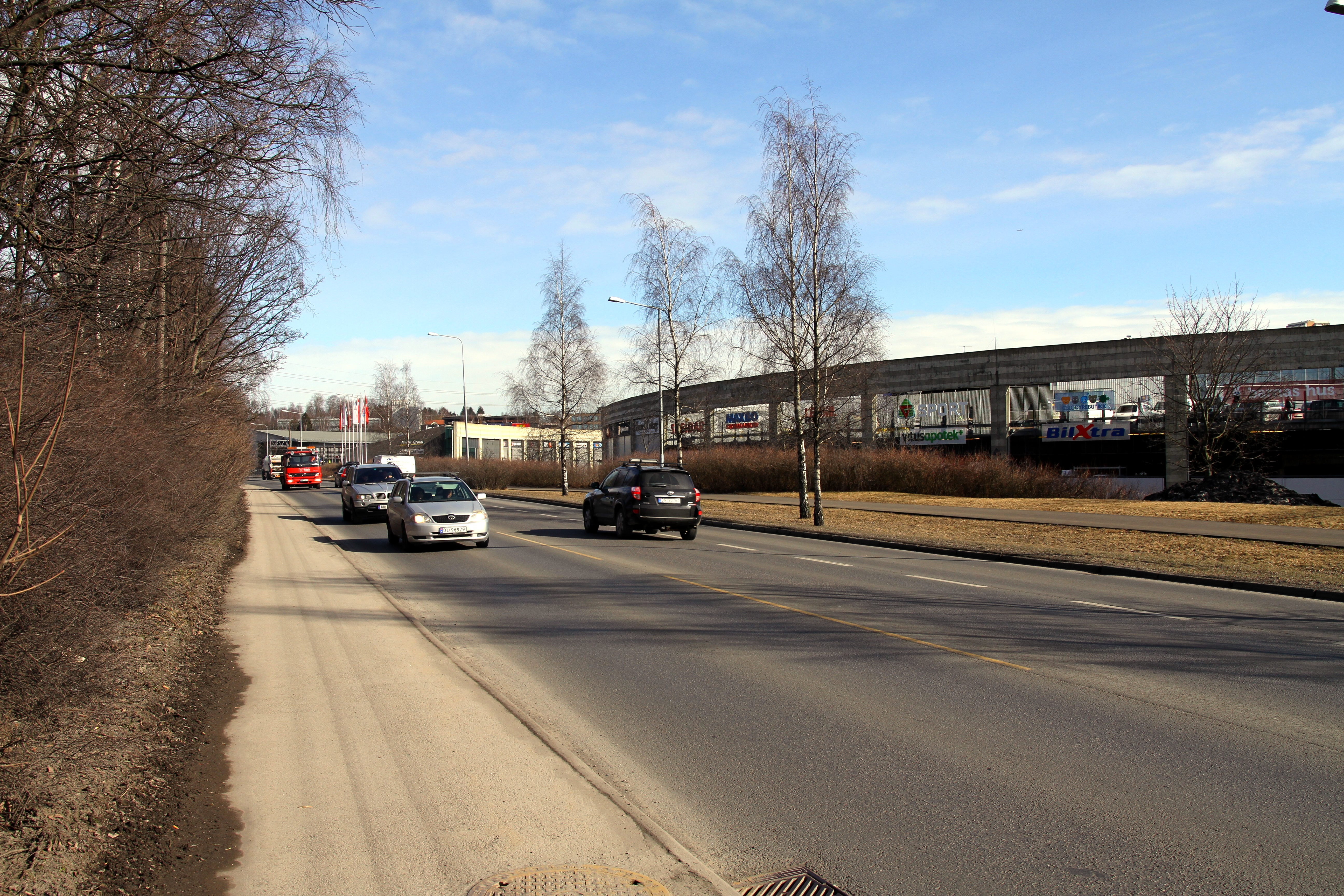 Strømsveien i Oslo. Alna senter i bakgrunnen.